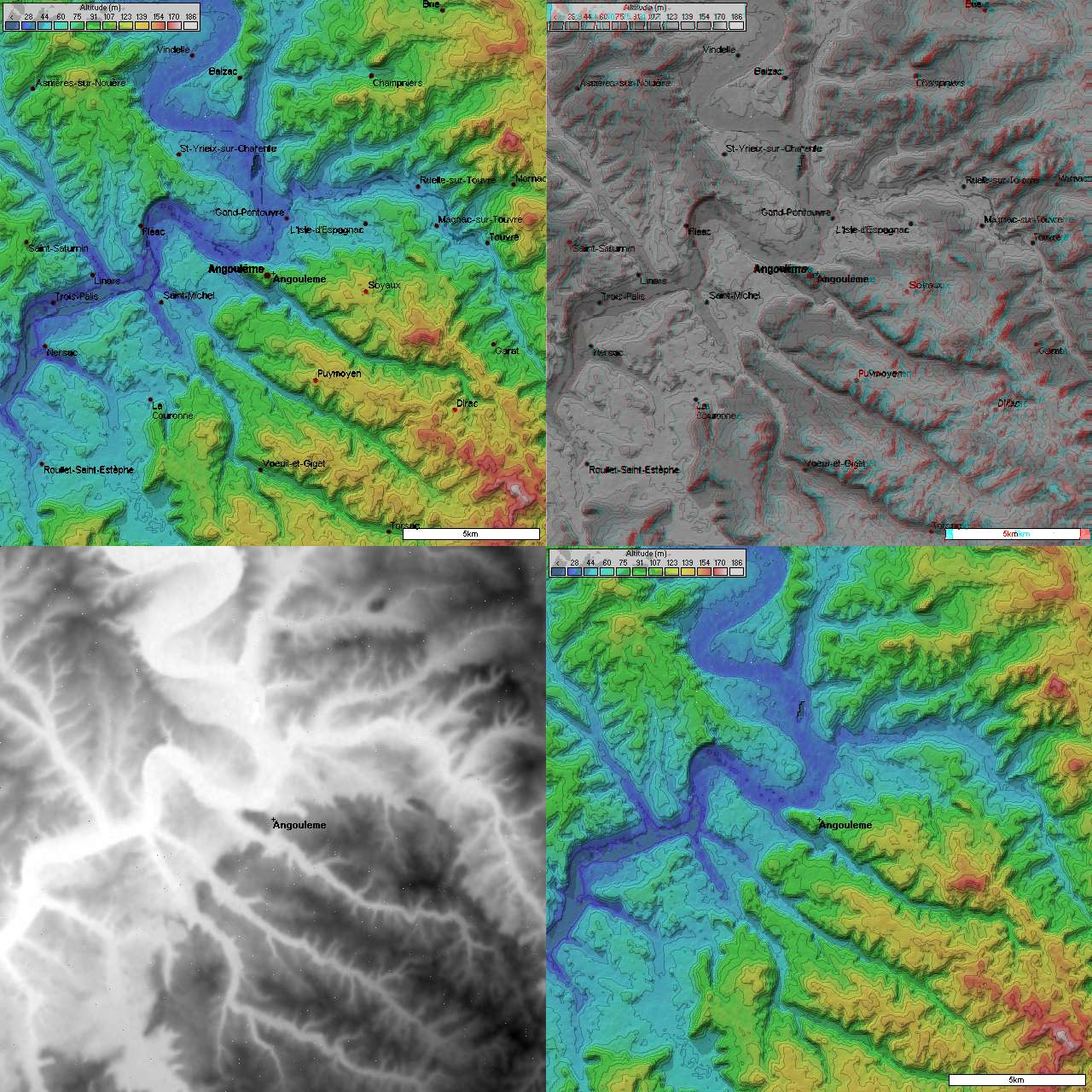 4 images topographiques (20 km de côté) d'Angoulême prises par la mission SRTM. Image topographique + position des villes image topographique en relief + position des villes image topographique en niveau de gris (utile pour déplacement map dans les logiciels 3D) Image topographique sans les villes Générée par le logiciel Radiomobile à partir des données domaine public de la mission SRTM de la NASA.